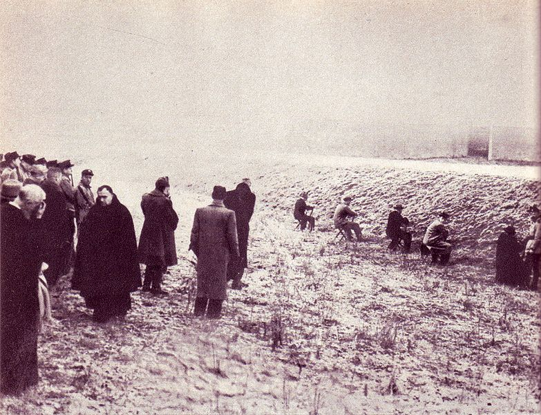 I condannati a morte che avevano firmato l'Ordine del giorno Grandi